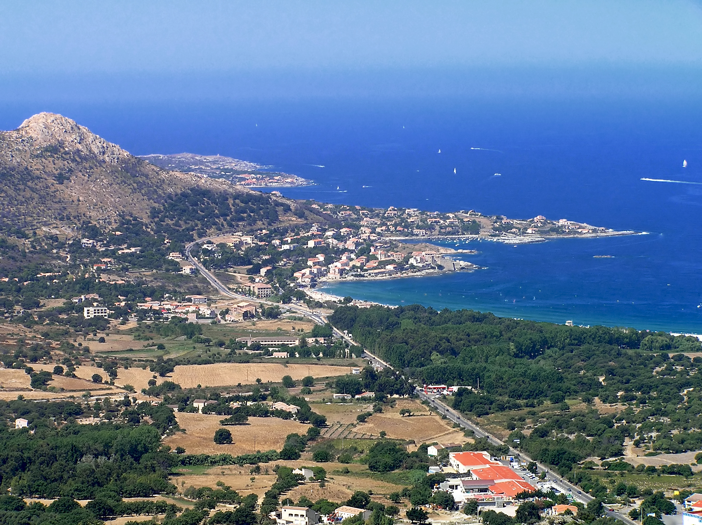 Algajola - Vue générale depuis Corbara